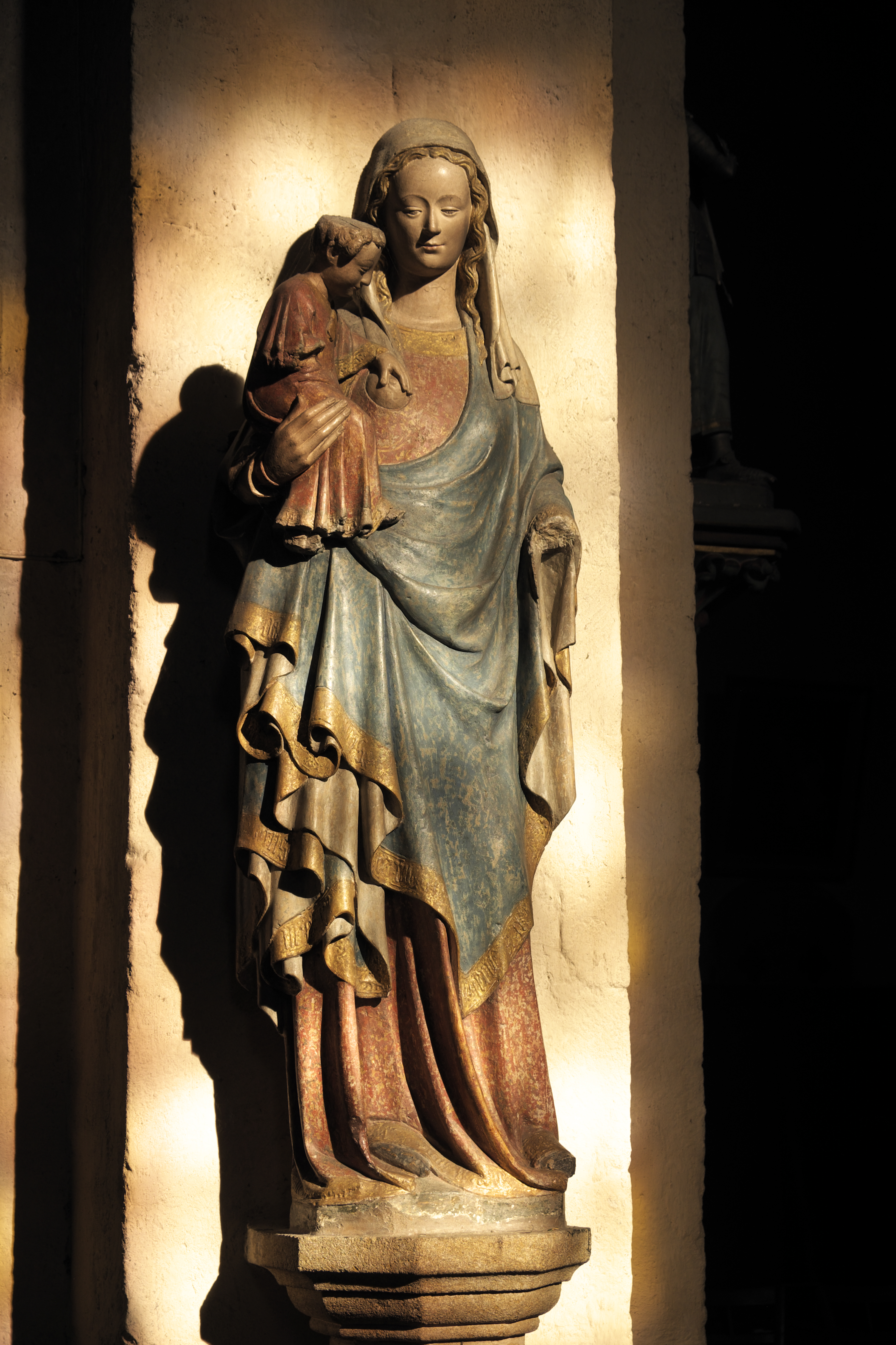 Katholische Kirche Saint-Pierre in Yzeure im Département Allier (Auvergne-Rhône-Alpes/Frankreich), Madonna mit Kind aus dem 15. Jahrhundert